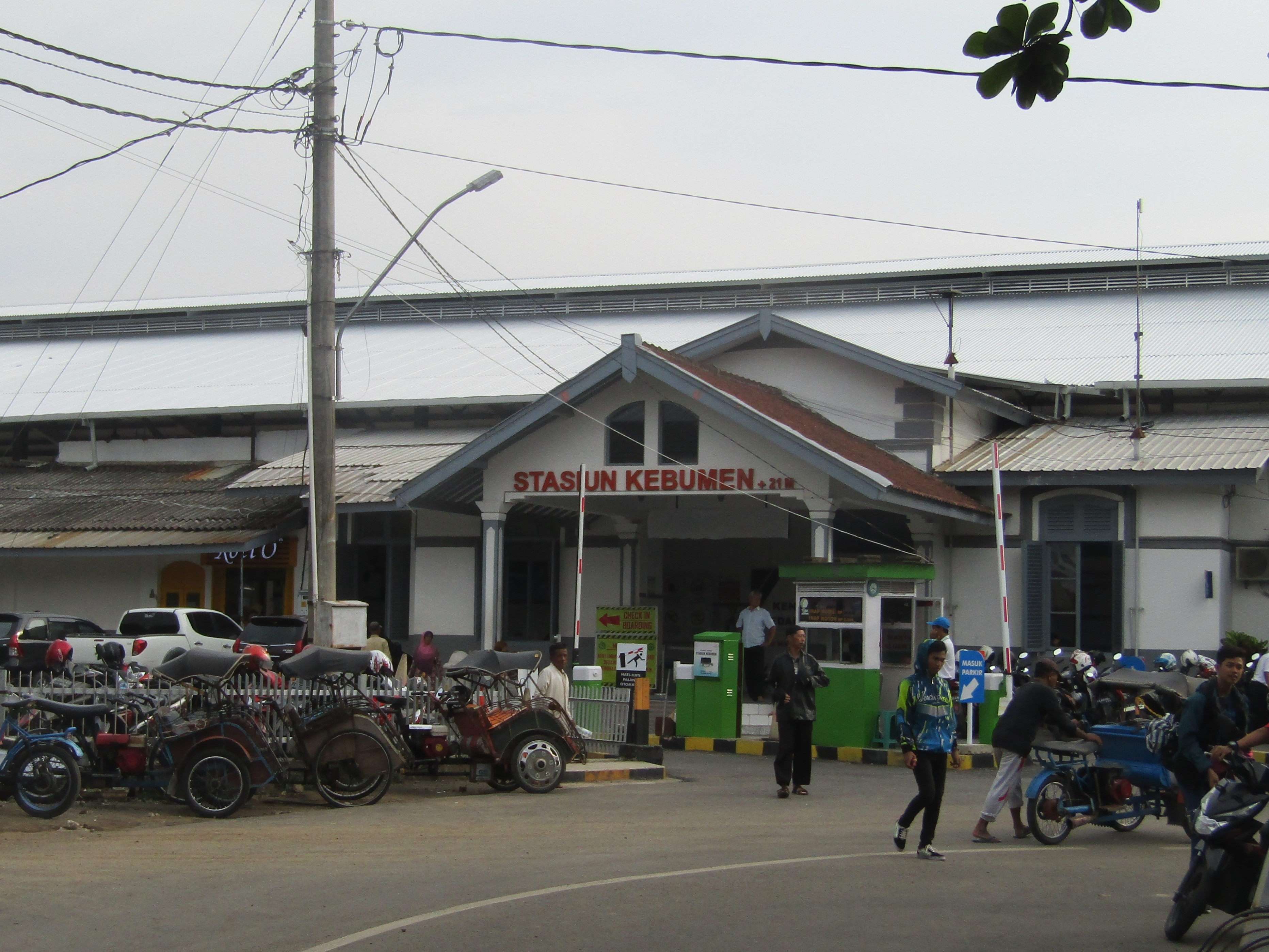 Tampak depan Stasiun Kebumen, 2019